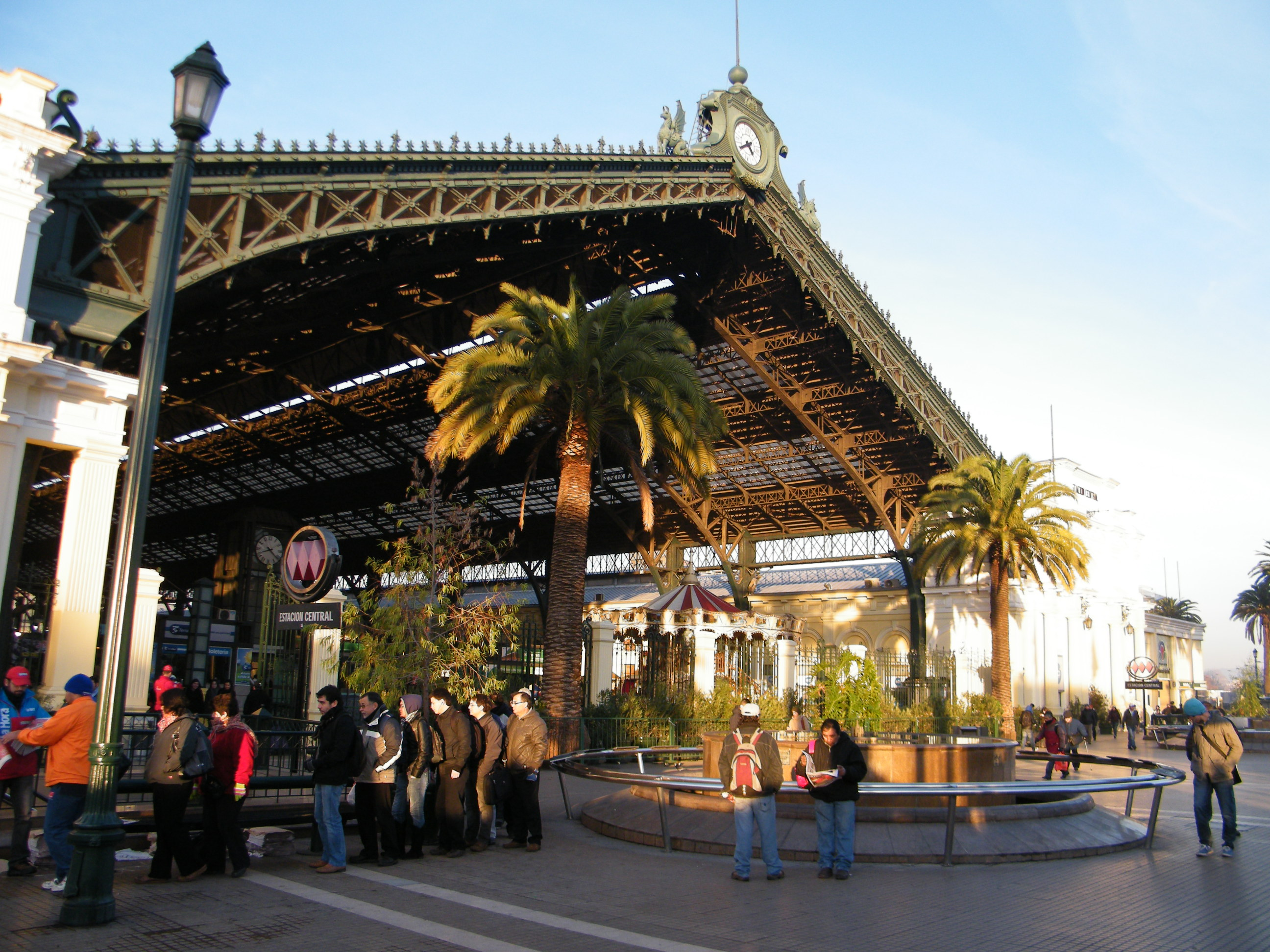 Estación Central de Ferrocarriles o Estación Alameda This is a photo of a national monument in Chile: 134